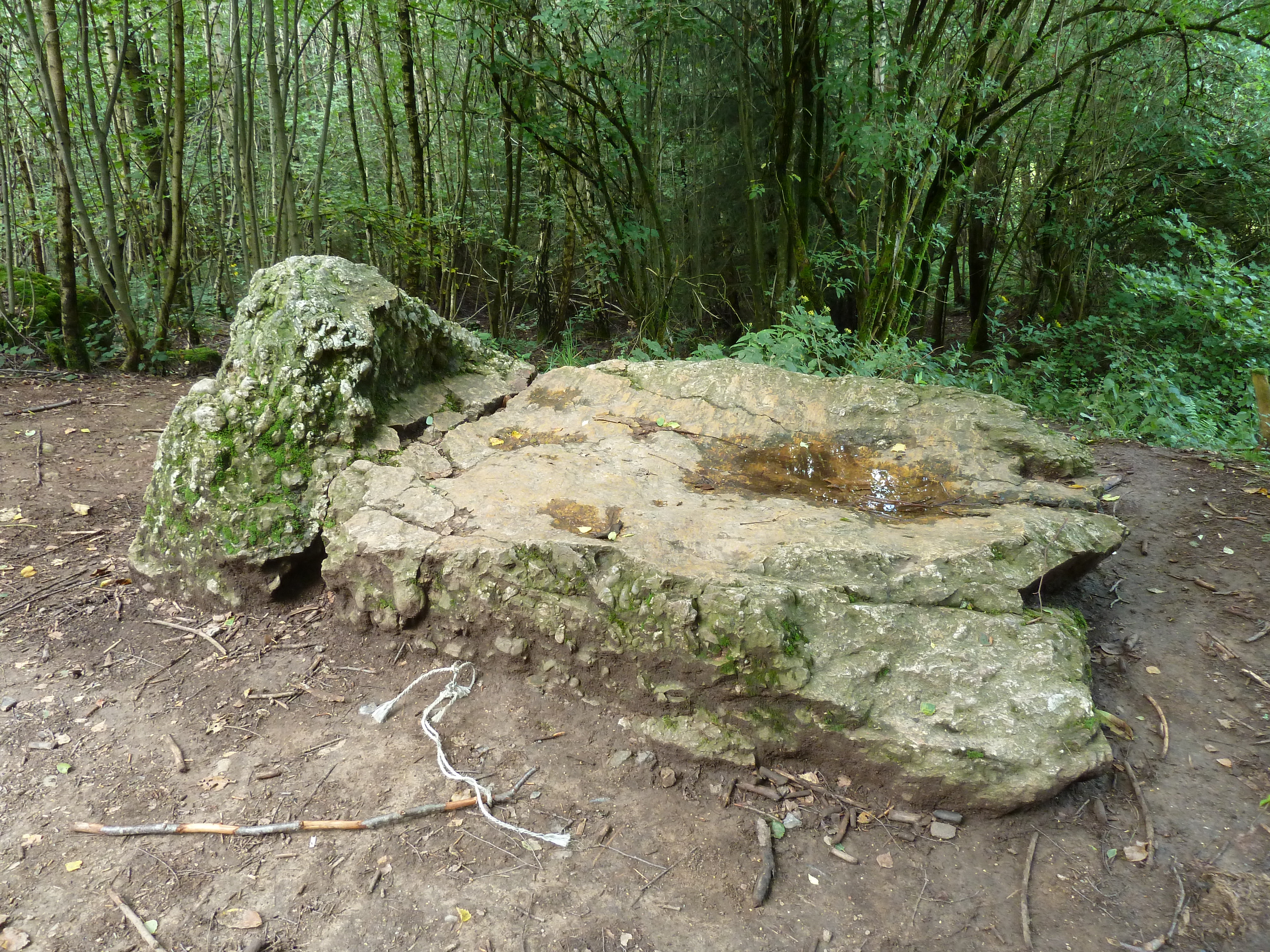 Le Lit du Diable, Wéris, Belgique